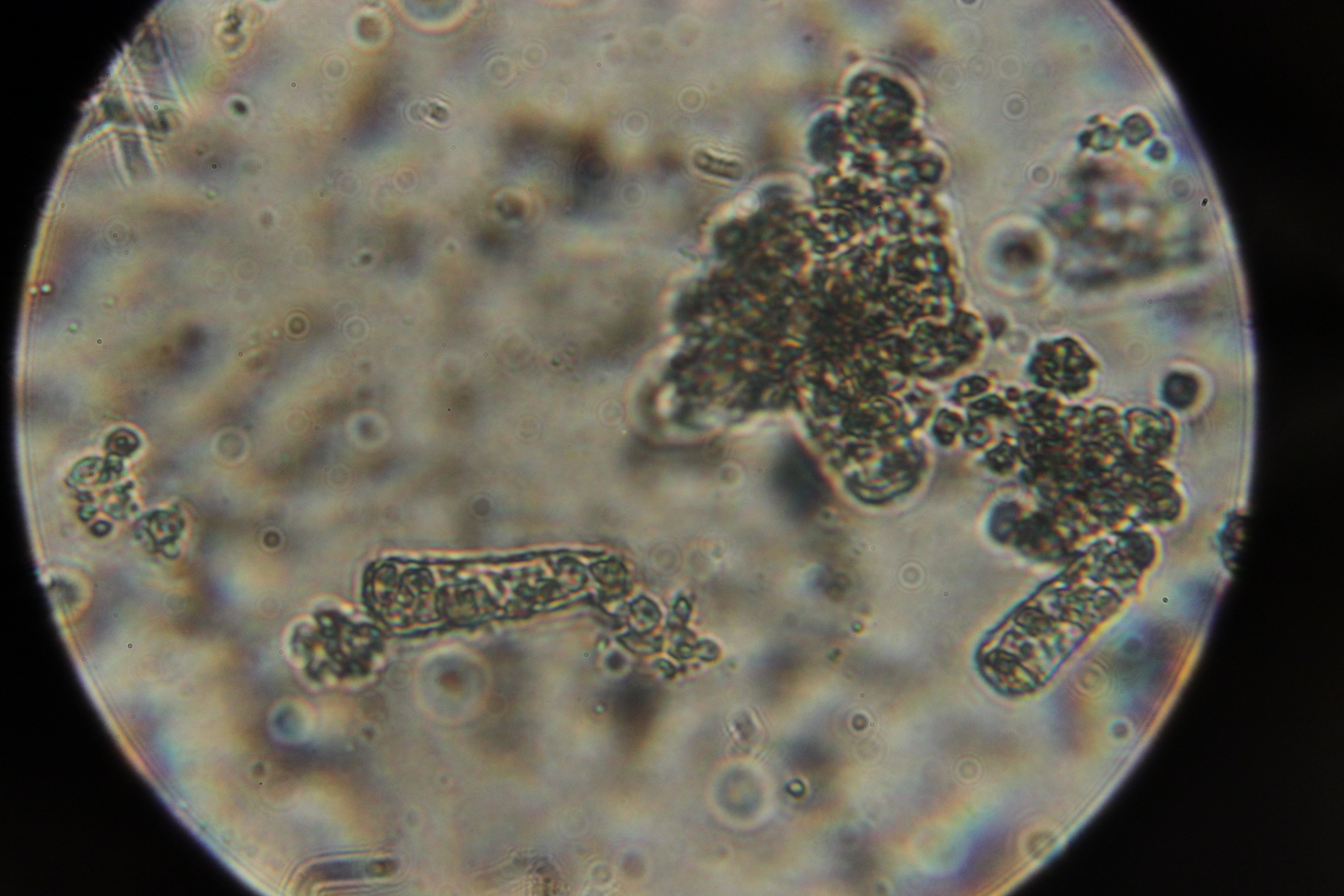 Taphrina sadebeckii on Common Alder - Alnus glutinosa